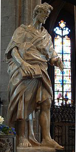 San Bartolomé, escultura en alabastro para el coro de Sainte-Waudru en Mons (Bélgica) realizada por el escultor Jacques du Broeuq (1505-1584) 23/08/05